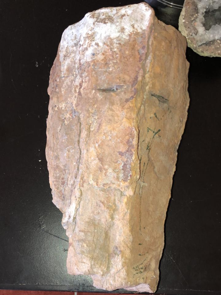 Fósil encontrando en Tezoacoalco, Oaxaca, México